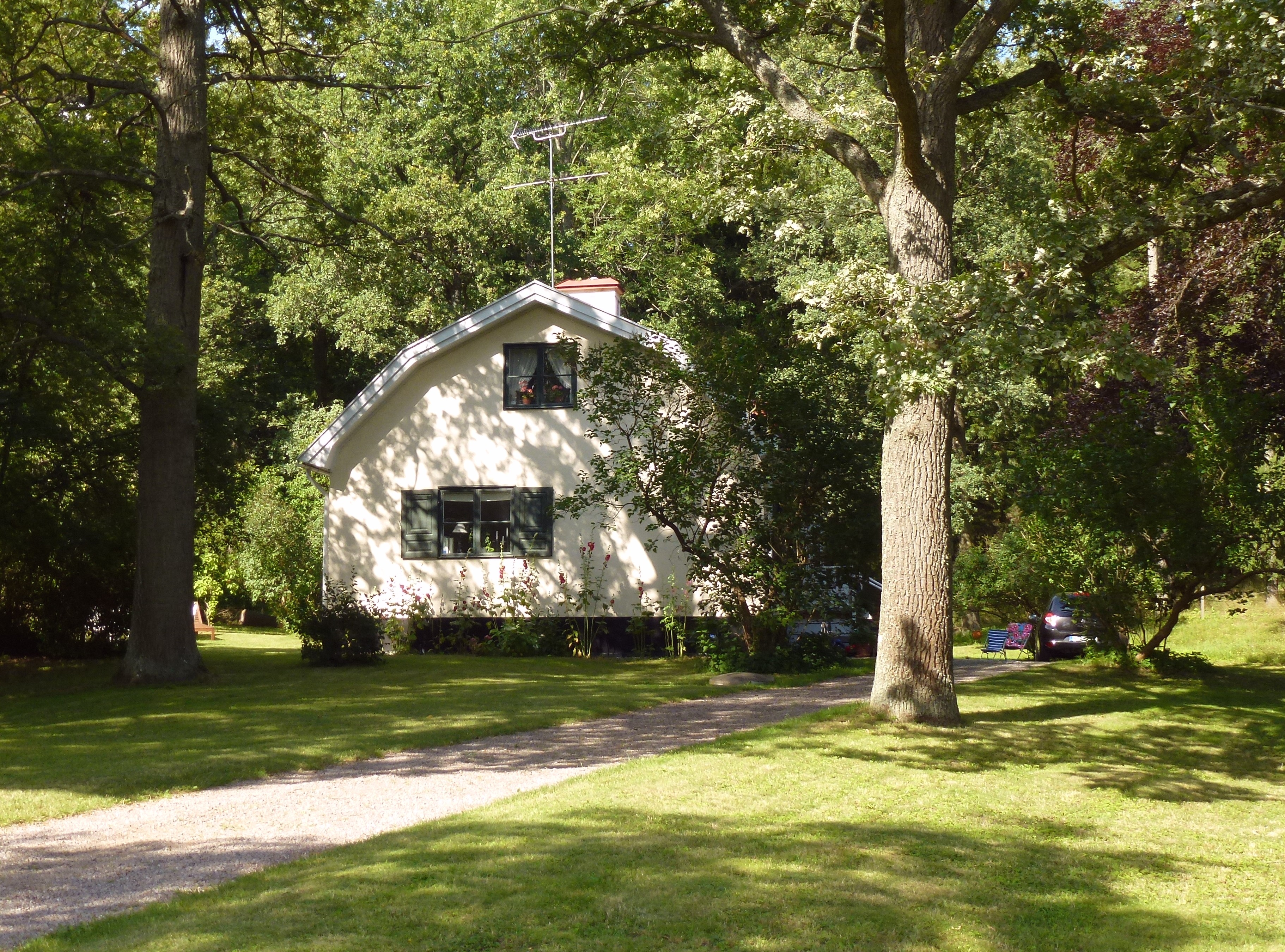 Evert Lundquists före detta bostdashus intill ateljén